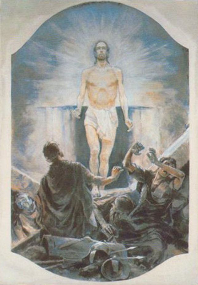 Kraigher Mlczoch - Auferstehungsfresko, 1947